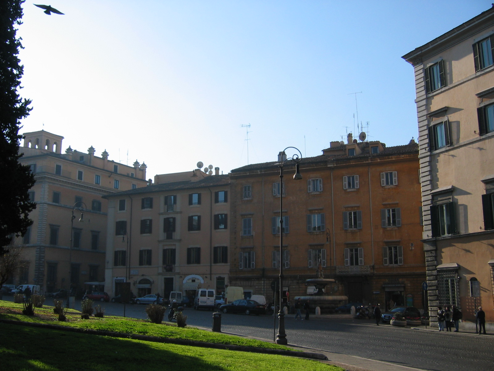 Description = Piazza d'Aracolei. Roma. Scorcio panoramico di Piazza d'Aracoeli vista dai giardini di Piazza Venezia. La piazza che si apre alle pendici del Campidoglio, nel rione X Campitelli, è qui fotografata con la sua fontana e i suoi palazzi: Muti-Bussi, Pecci-Blunt, Colonna. La piazza. Source = own work Date = 2006-12-28 Authors = “Sara Di Marcello(User:Sara Di Marcello)” “Livia Mandalà(User:livman)”. . Permission = We, the authors of this work, hereby release it into the public domain